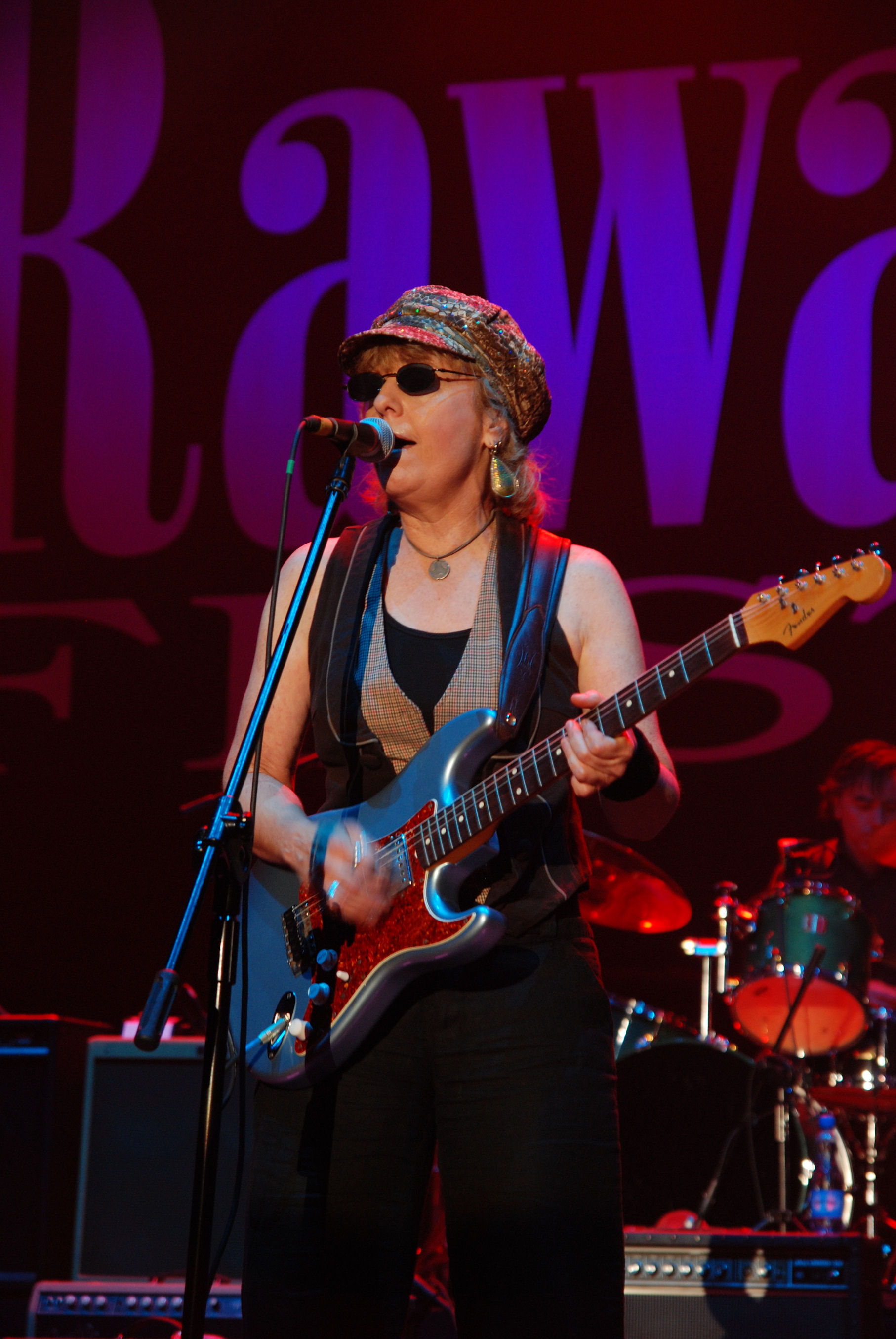 28 Edycja Rawa blues Festival, Katowice Spodek - Debbie Davies